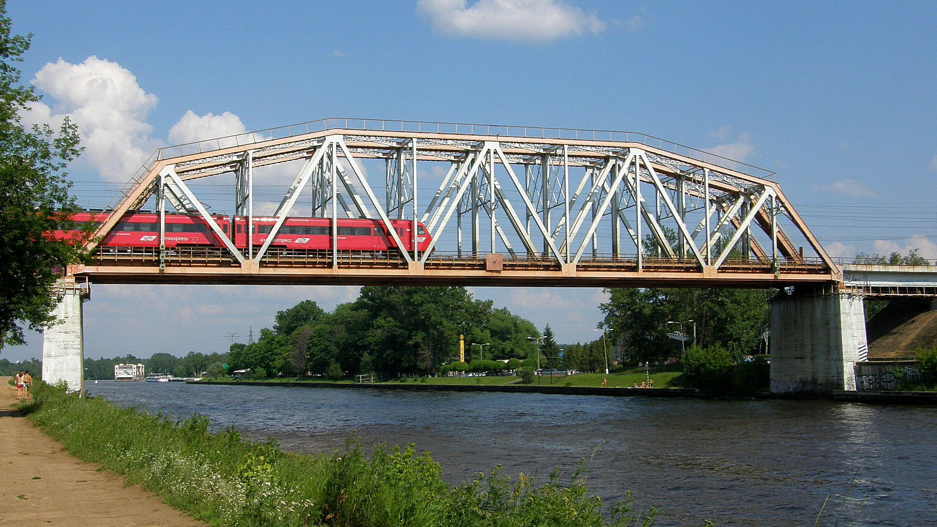 Мост Савёловской ж.д.